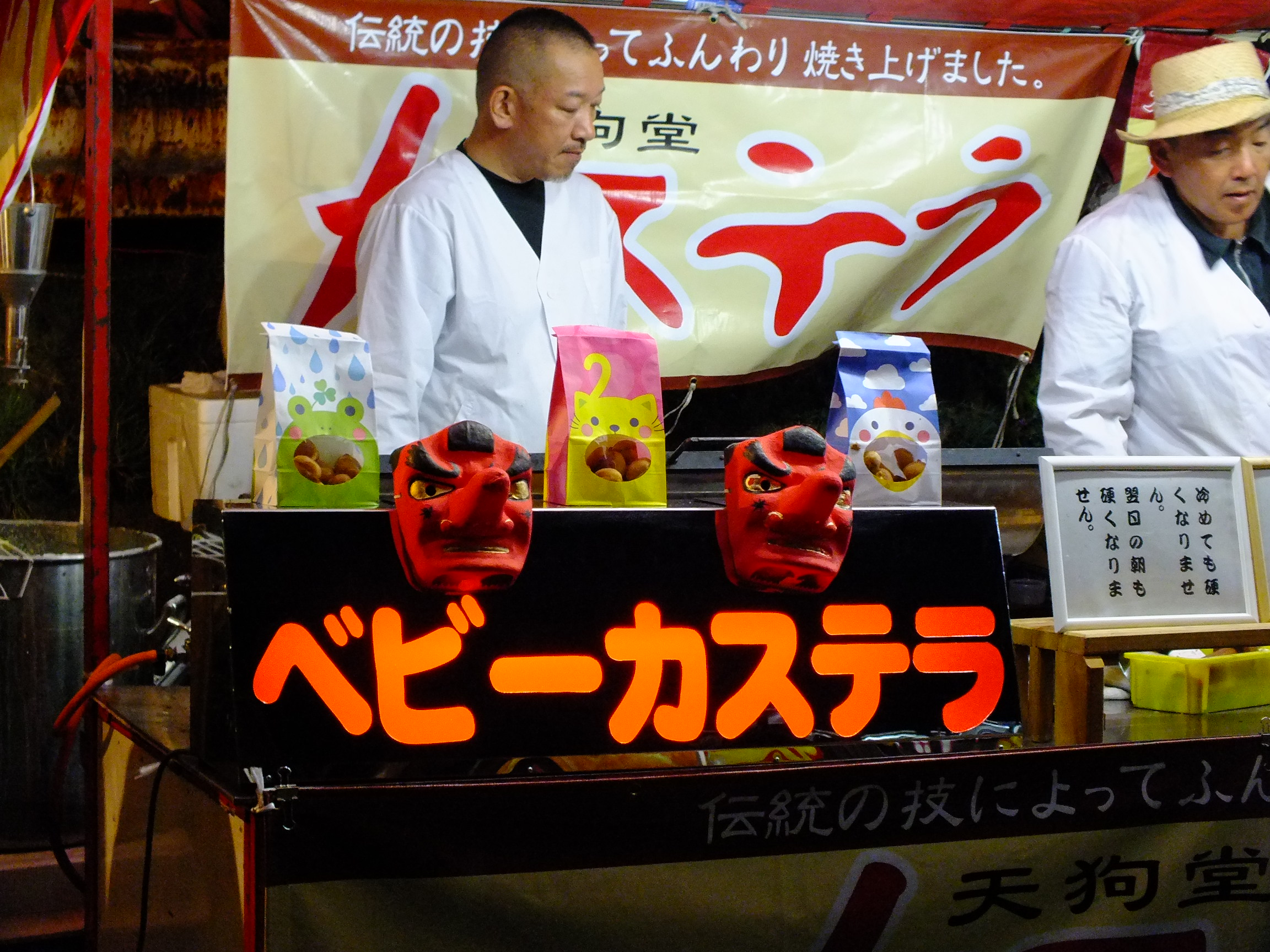 20140729 Ichijima-Kawasuso Matsuri 市島川裾祭（丹波市市島町）